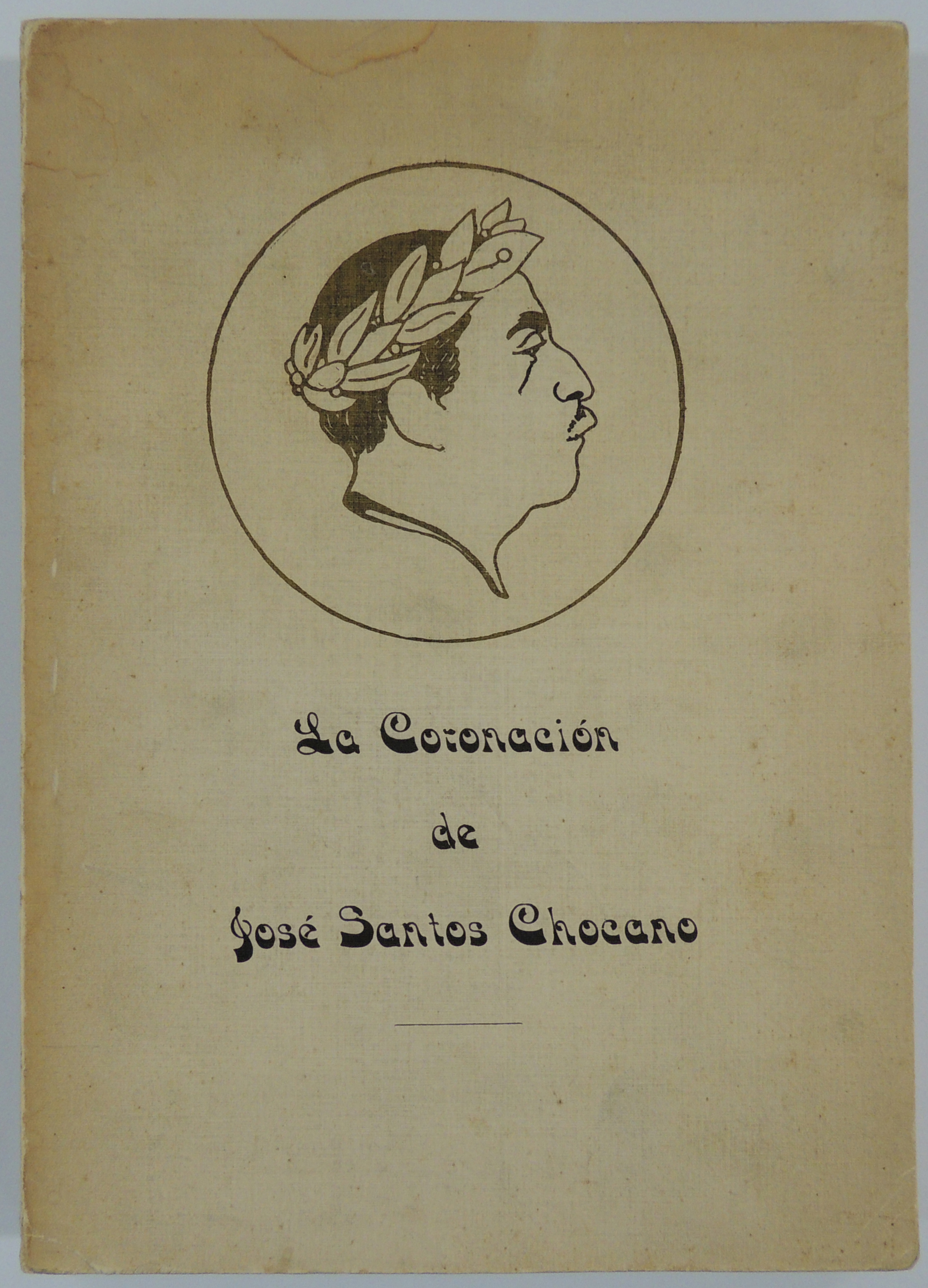 Coronación de José Santos Chocano